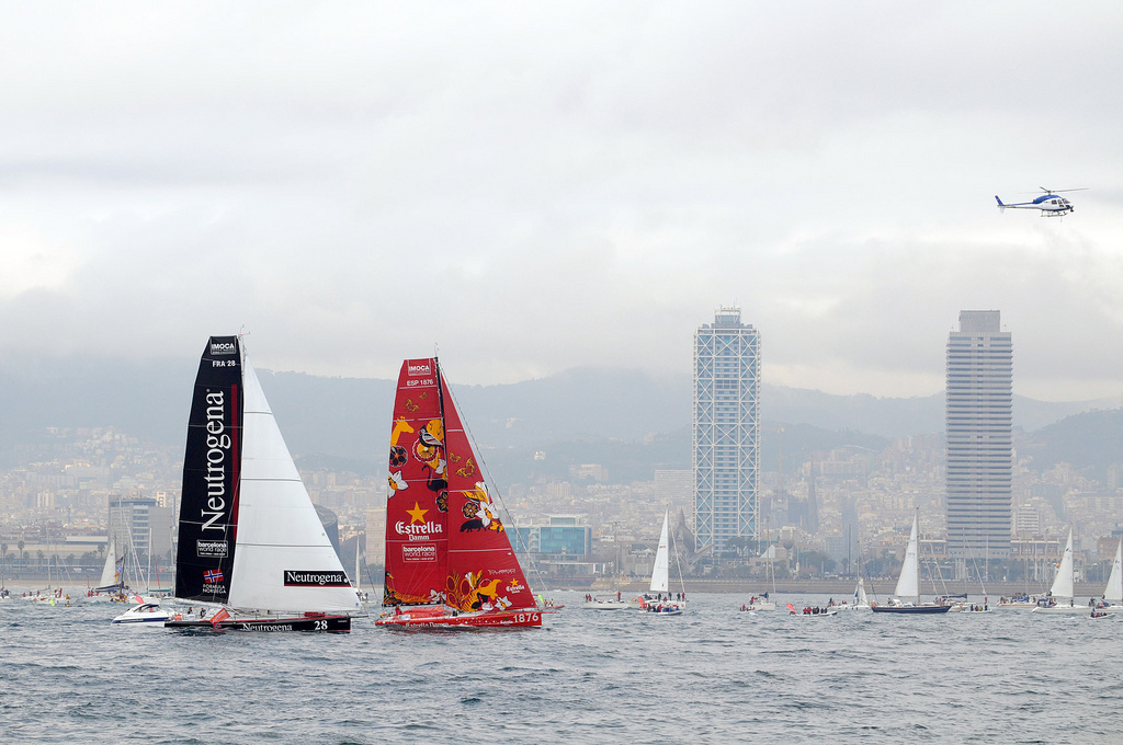 Salida Barcelona World Race